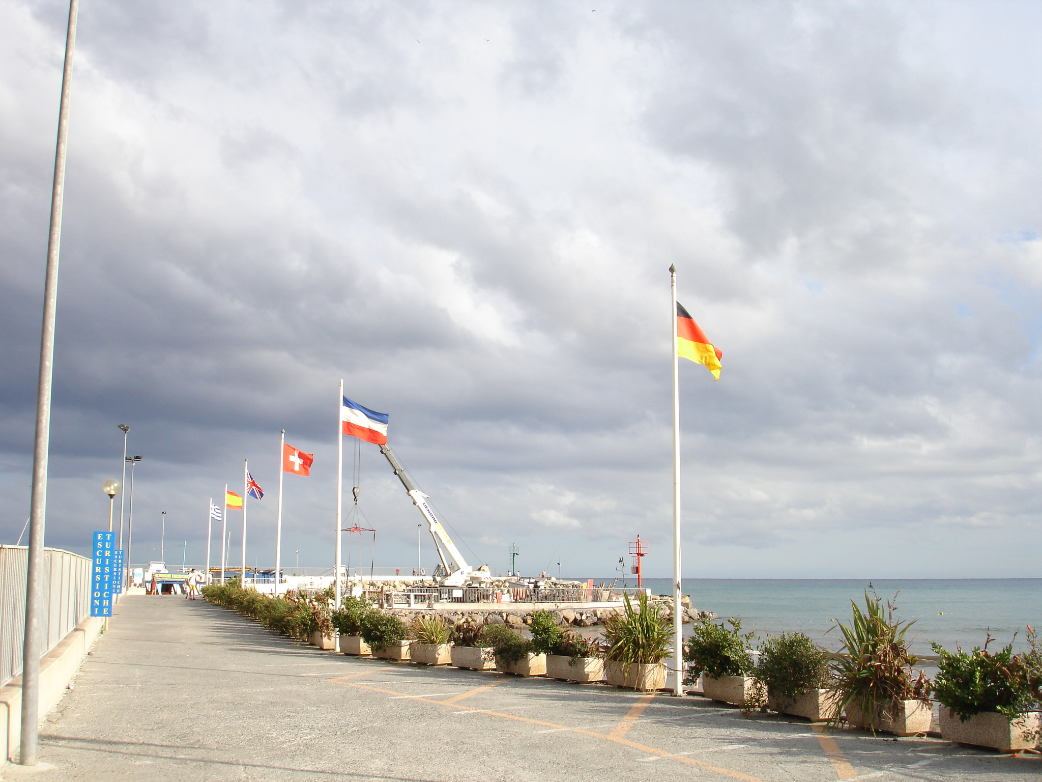 Autore: Tony Frisina